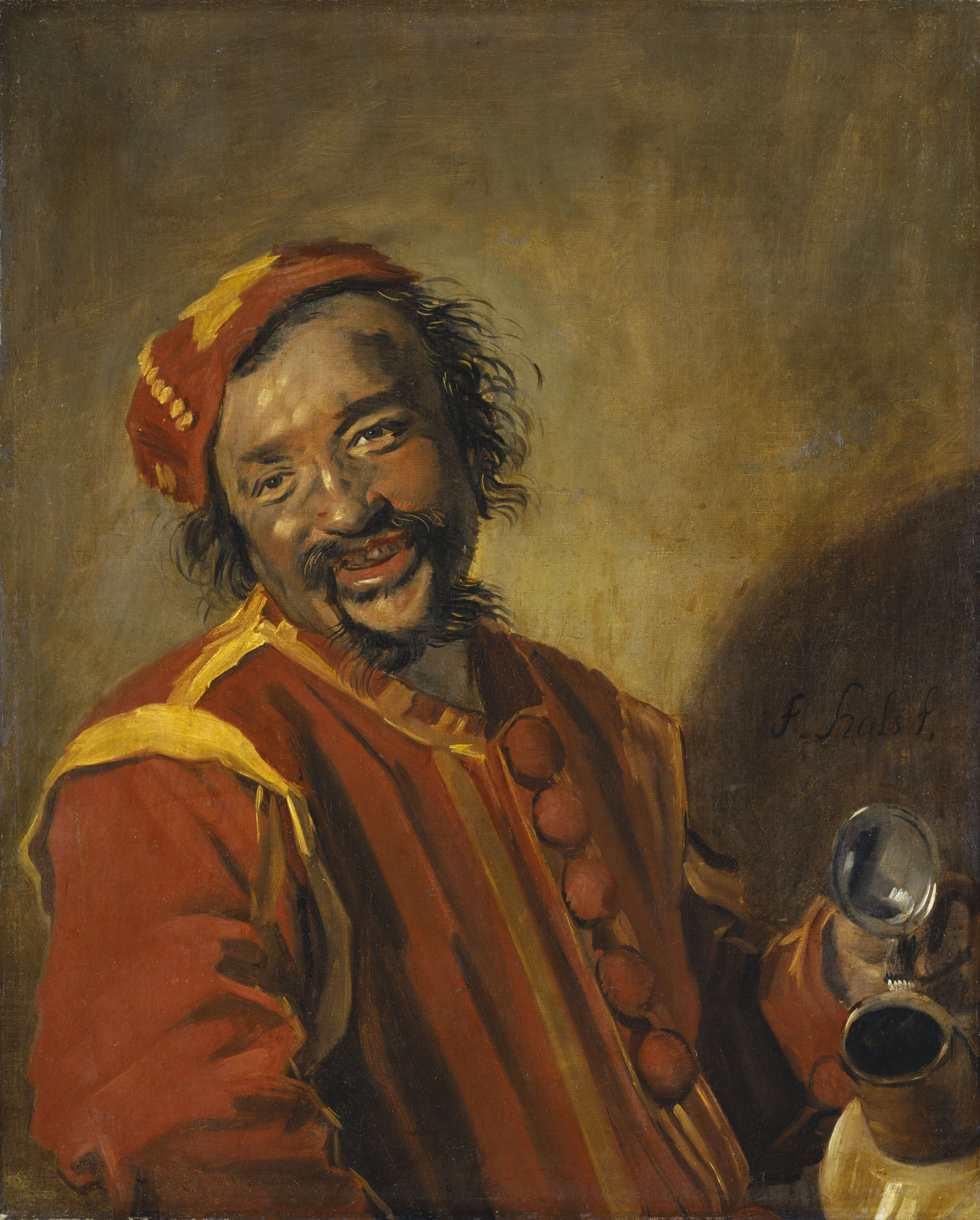 Peeckelhaering (Pökelhering) ist die dem Hanswurst entsprechende Figur des niederländischen Volkstheaters.